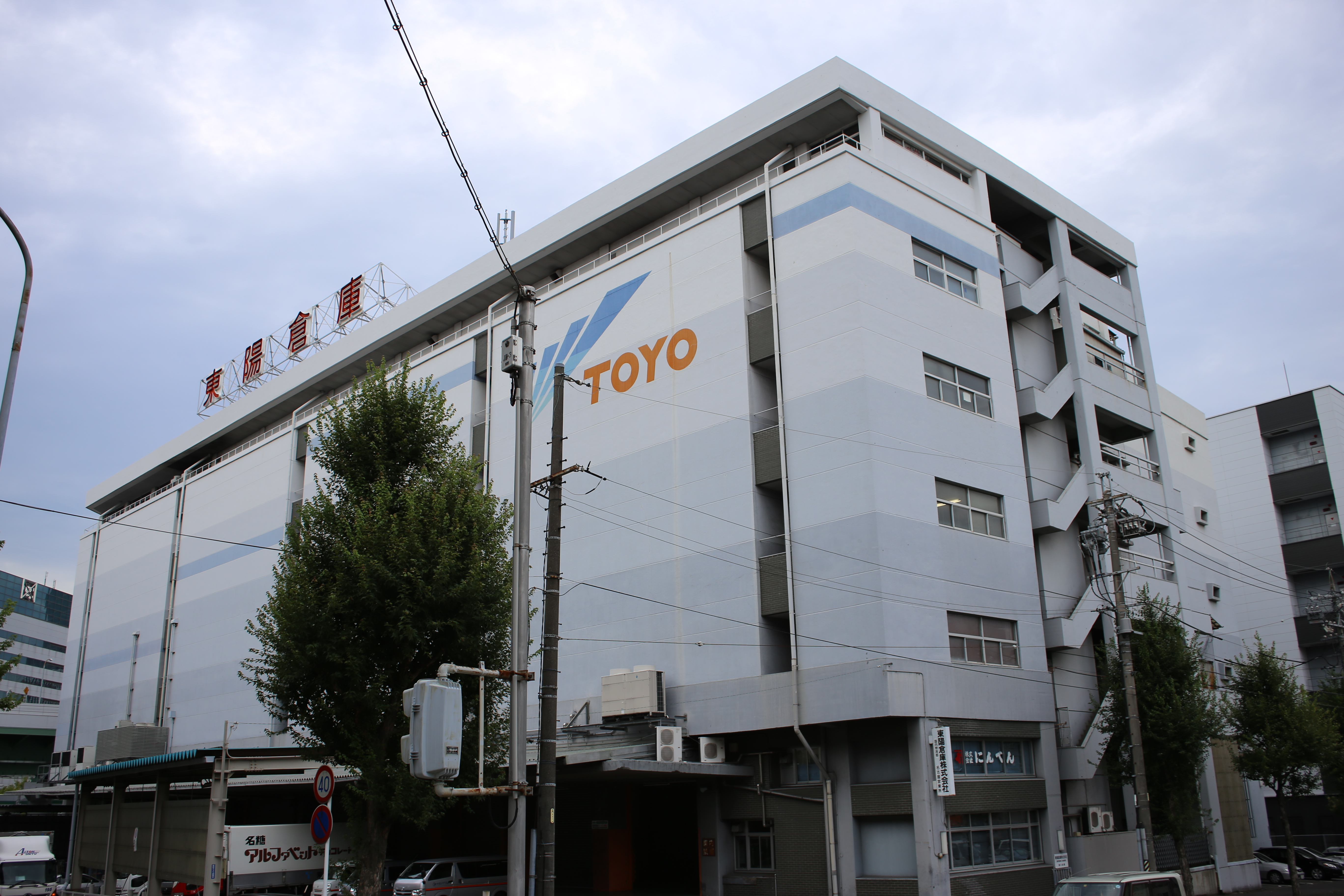 名古屋市中村区名駅南二丁目の東陽倉庫本社を南側公道東側より撮影